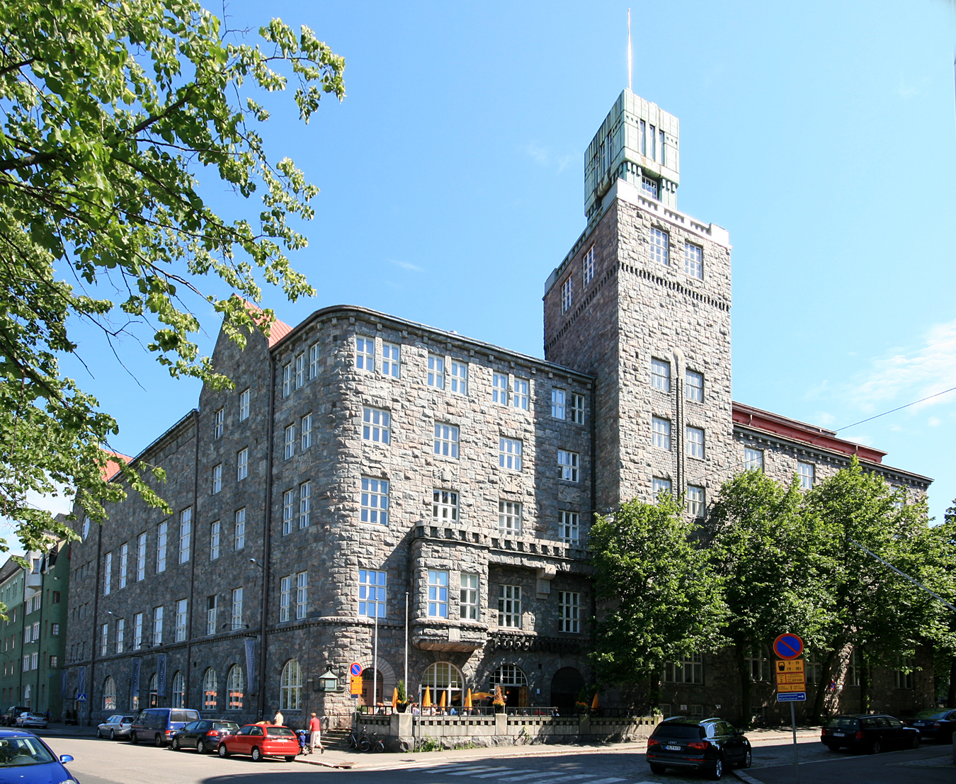 Työväentalo, Kallio, Helsinki.